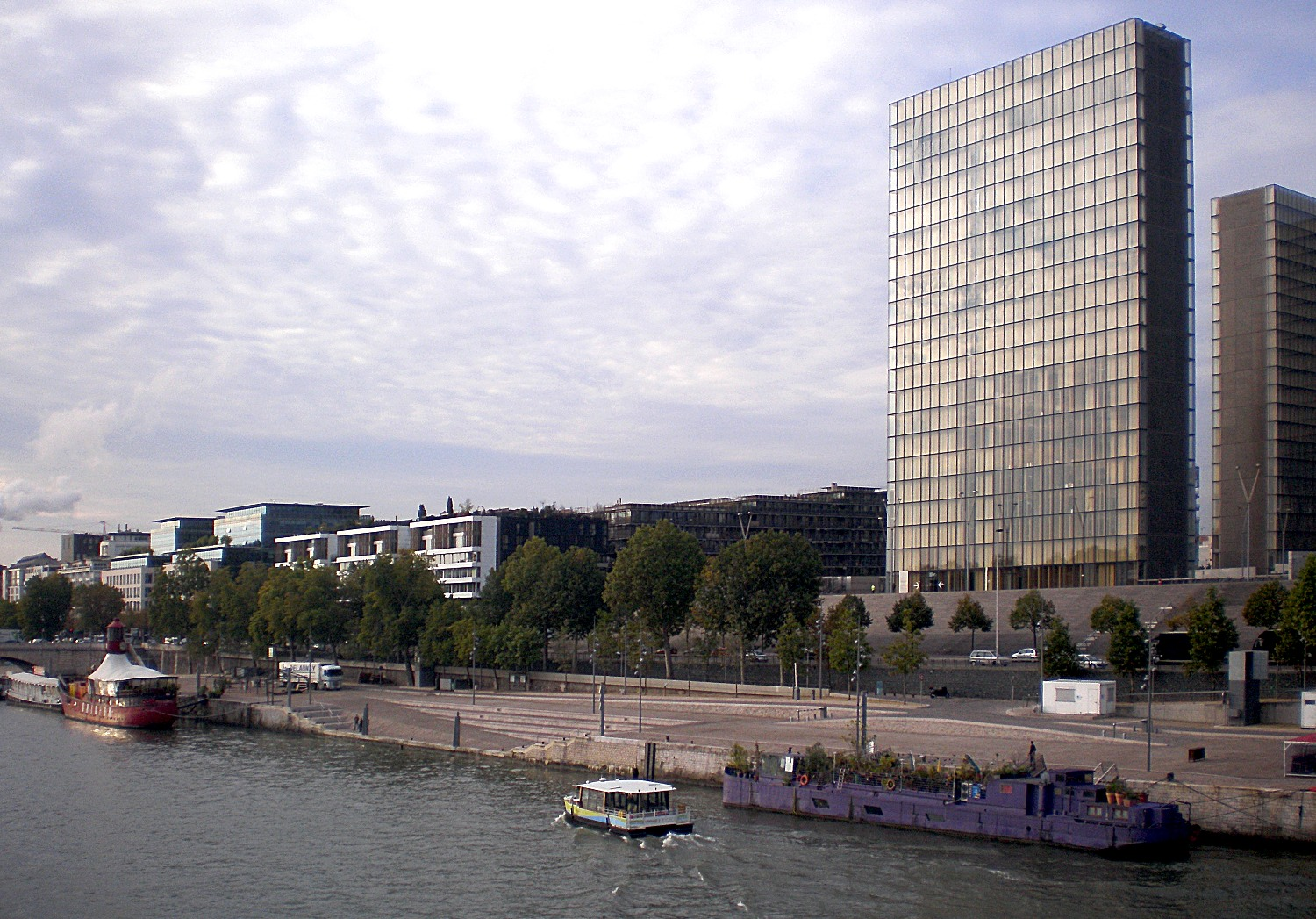 Quai François Mauriac - Paris